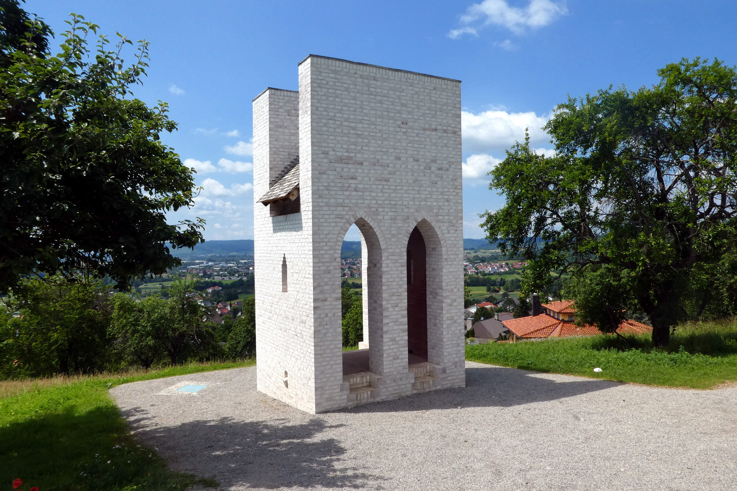 Plüderhausen - "Hochzeitsturm". Das Bauwerk entstand als Station 6 der "16 Stationen" der Remstal-Gartenschau 2019.